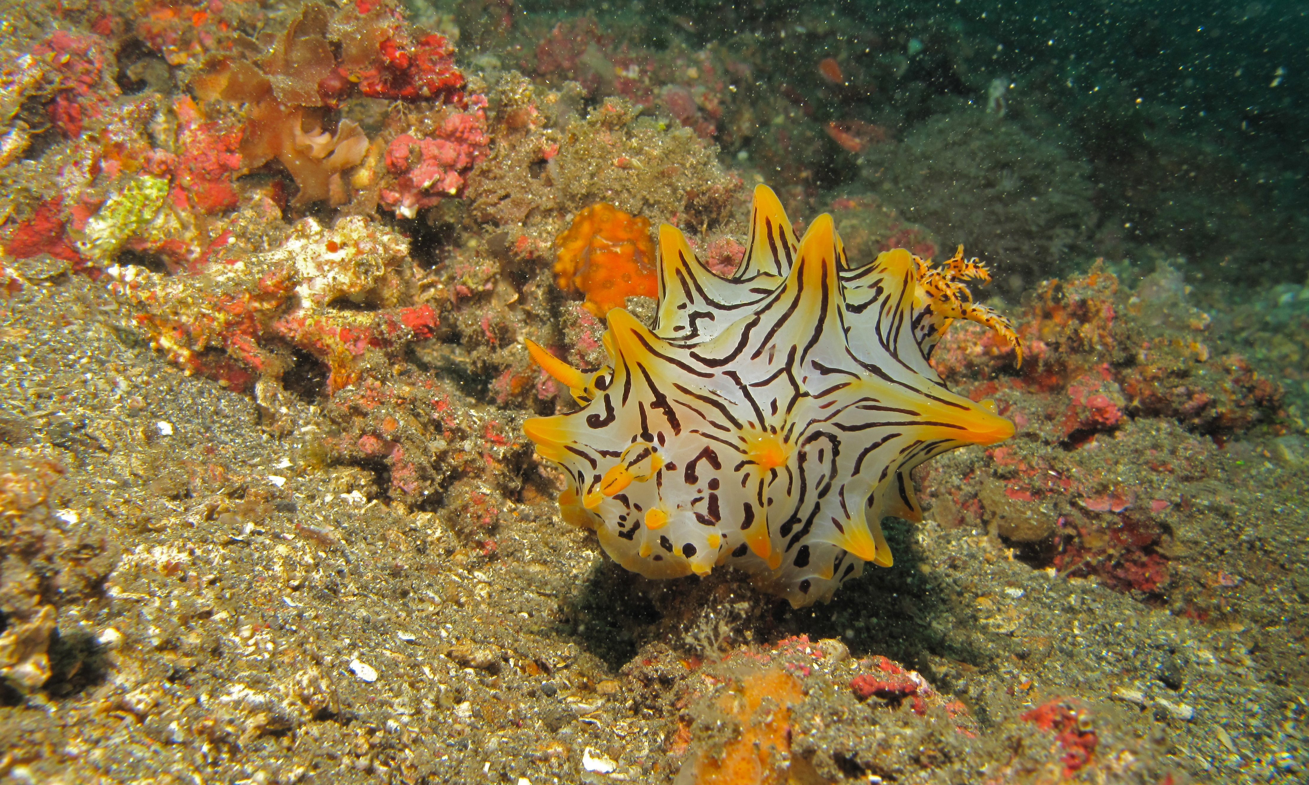 Makawide Island, Lembeh Strait, Sulawesi, INDONESIA